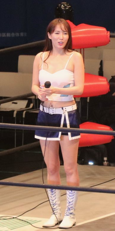 「WRESTLE WARS 2020」3.15東京・大田区総合体育館大会 チアワン